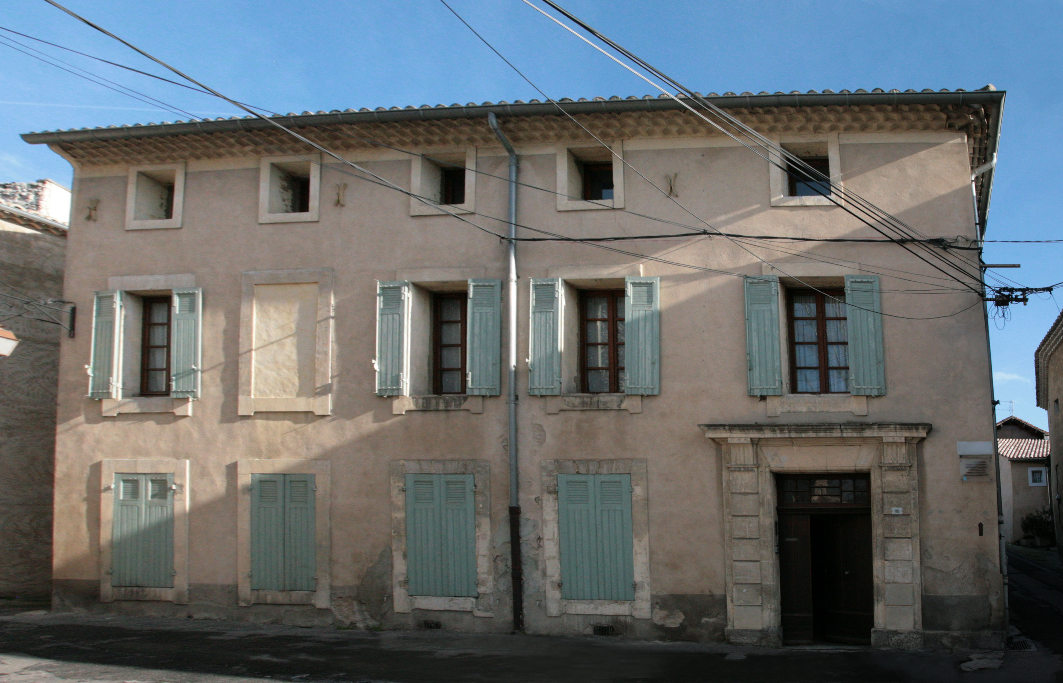 Maison natale de Louis Giraud, Pernes-les-Fontaines, Vaucluse, France